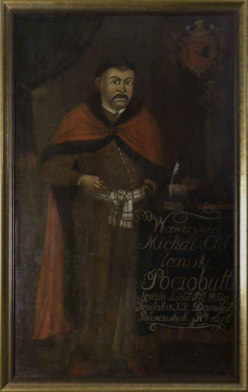 Lauryno Mykolo Odlianickio-Počobuto portretas